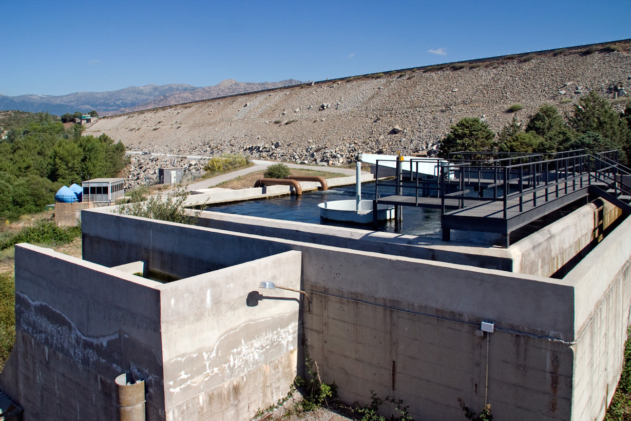 Válvula de regulación (Neyrpic) del nivel del depósito de inicio del Canal de Santillana